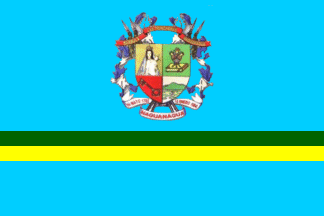 la Bandera del Municipio Autónomo Naguanagua